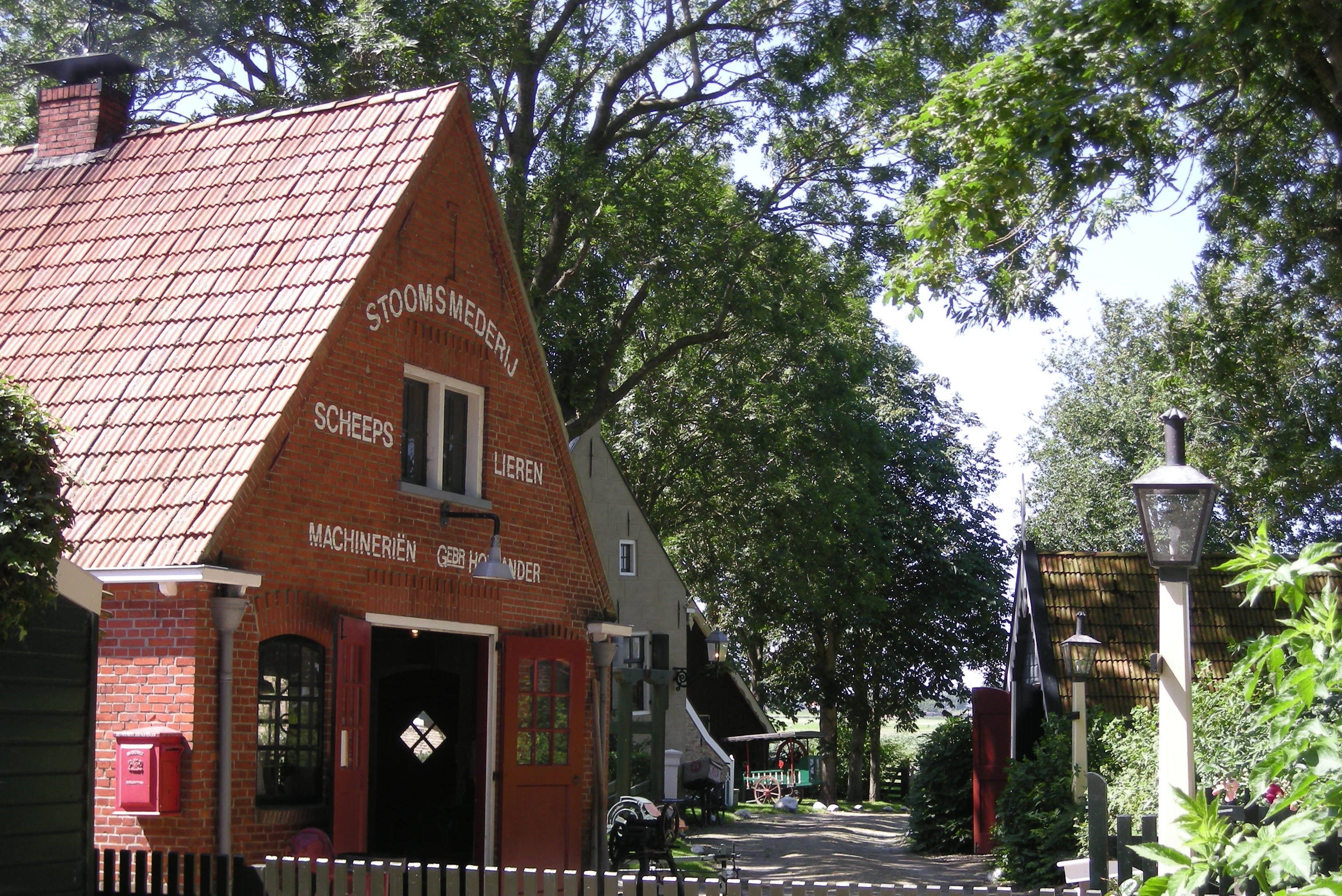 Allingawier